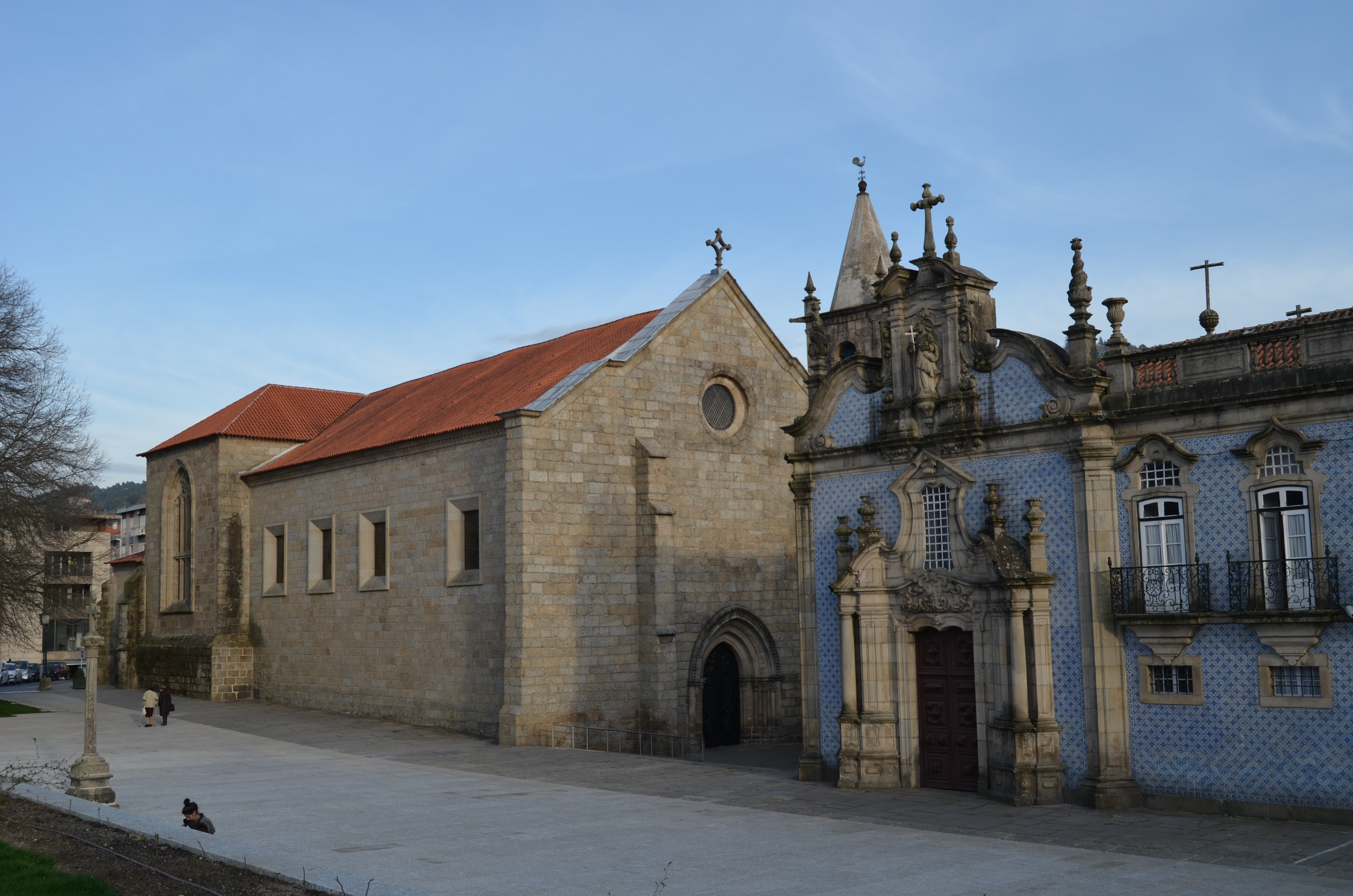 Medieval meets Modern